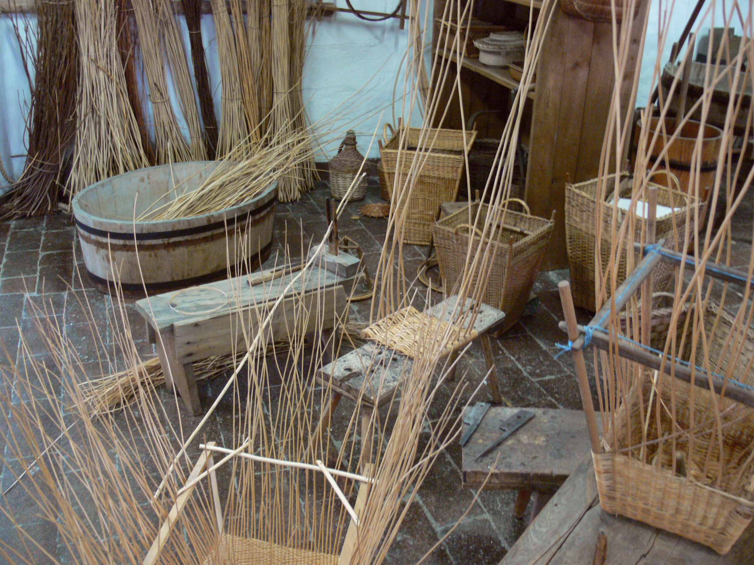 Korbmacherwerkstatt. Museum für Thüringer Volkskunde, Erfurt.